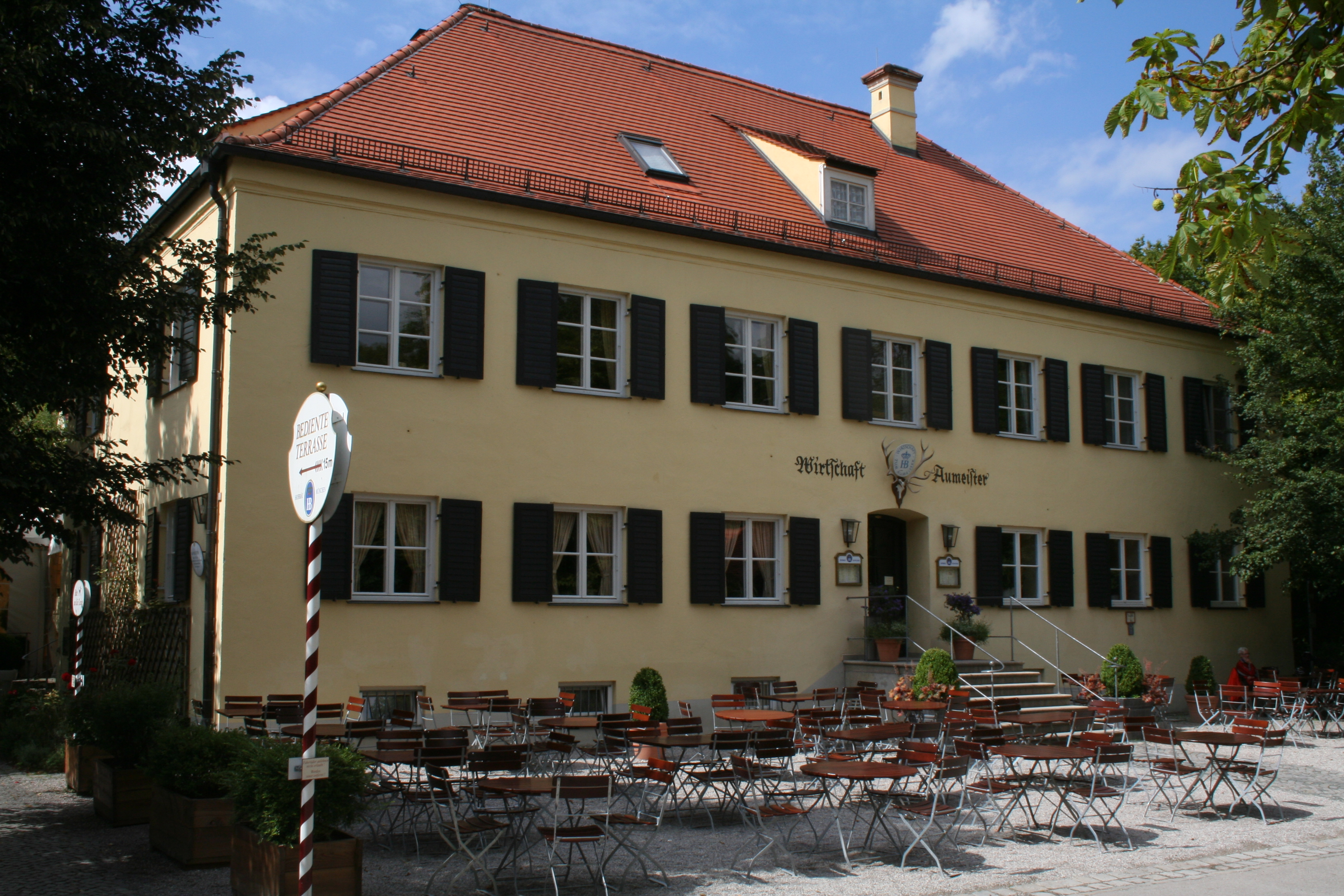 Aumeister Biergarten in the English Garden (Englischer Garten)